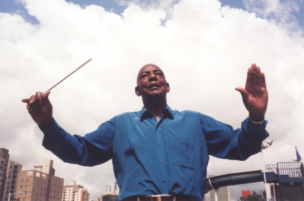 o maestro da massa regendo a torcida